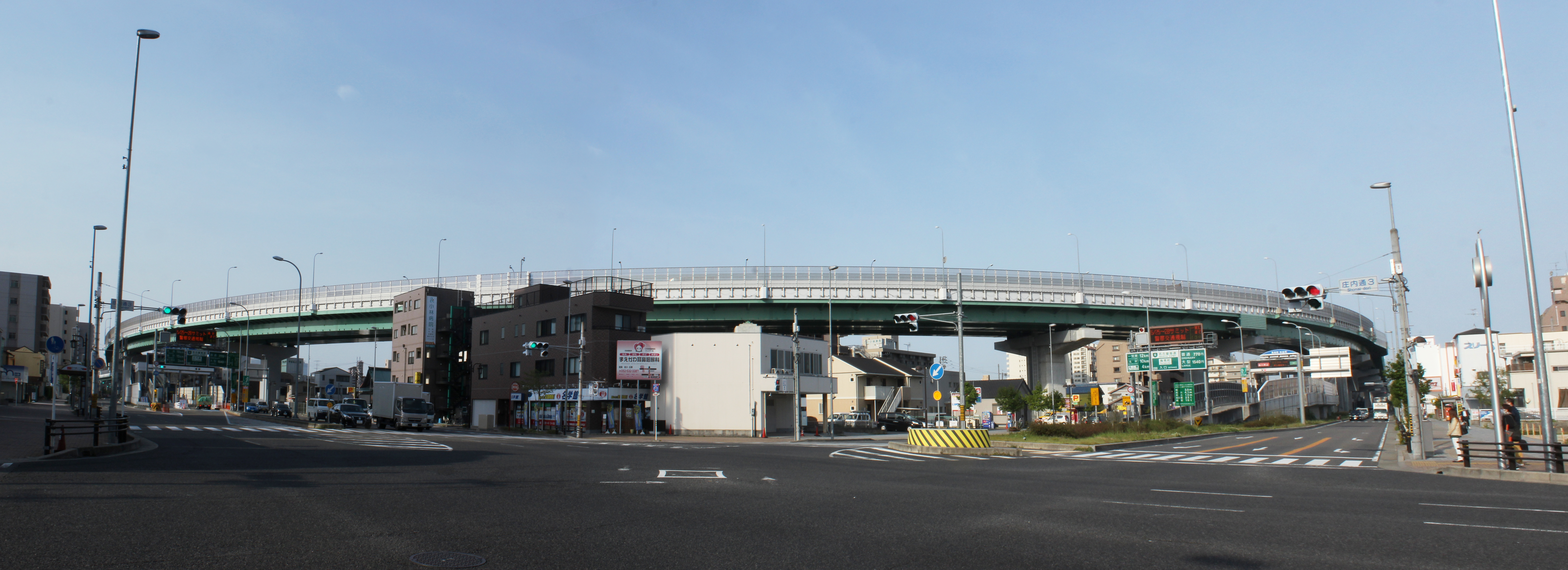 名古屋高速6号清須線 庄内通3丁目付近（左右2枚から成る合成写真）